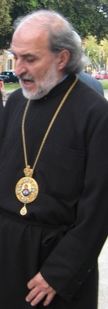 Isidoro Battikha, Vescovo Melkita, a Roma, 2008